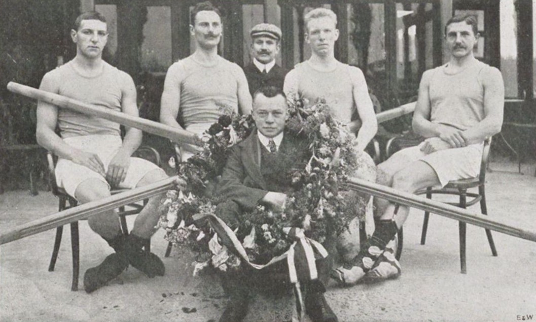 Amstel's Oude Vier. Bernardus Croon, Albertus Wielsma. J. J. K. Oohms (trainer), Johan Burk, Hermannus Höfte, Q. W. Jansen (stuurman).